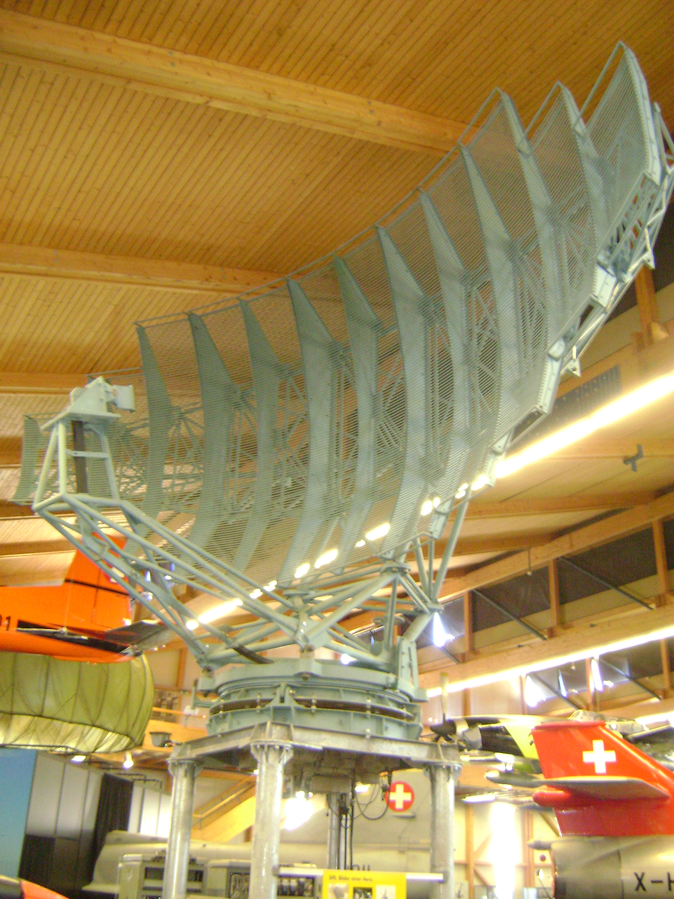 SF Radar